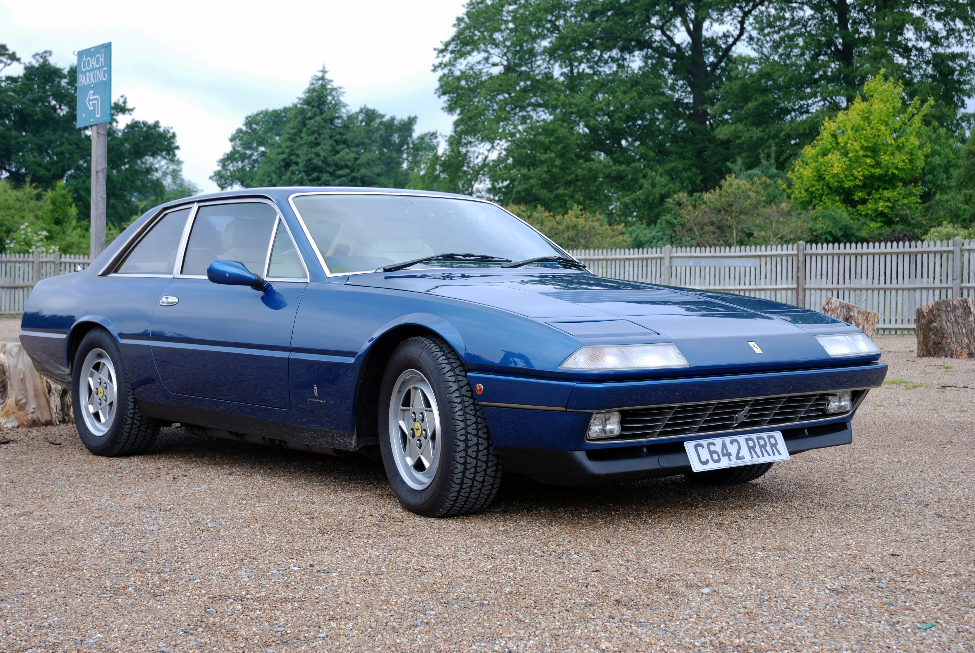 Borde Hill,June 2008